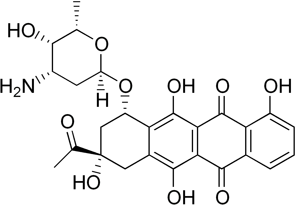 chemical structure of carubicin